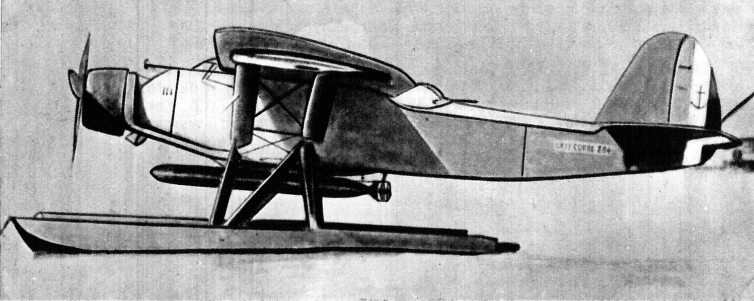 Francuski wodnosamolot torpedowo-bombowy Latécoère 294.